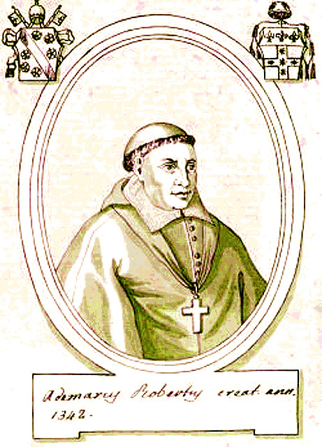 Cardinal Adhémar Robert